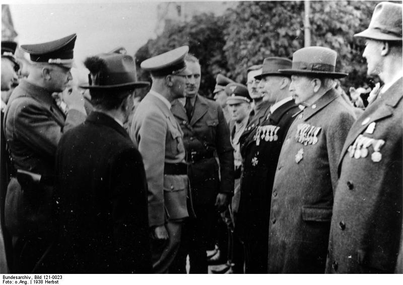 Staatsbesuch des Reichs und Preußischen Ministers des Innern Dr. Wilhelm Frick in Sudetenland Alte Veteranen